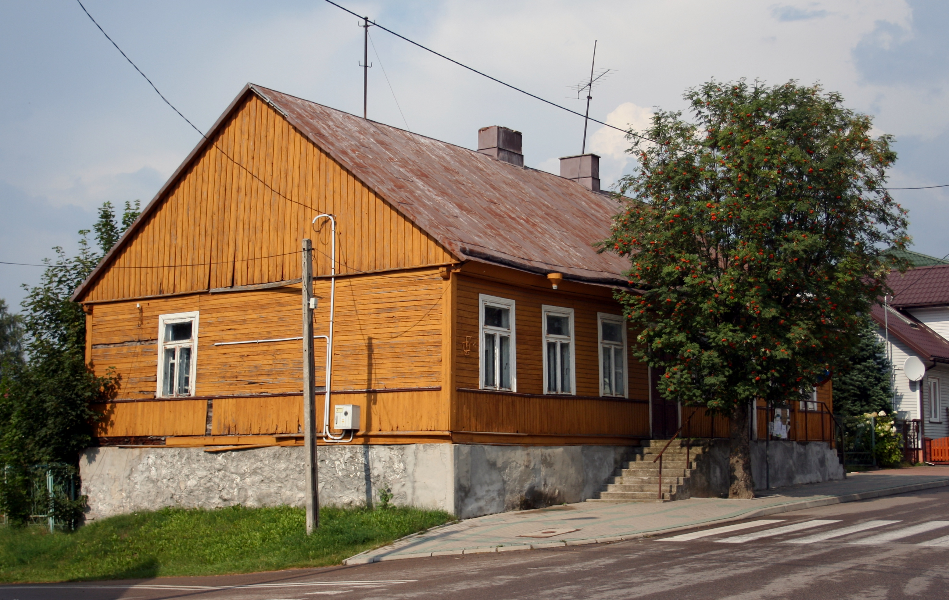 "Dom rabina" przy ul. Mickiewicza w Puńsku, woj. podlaskie